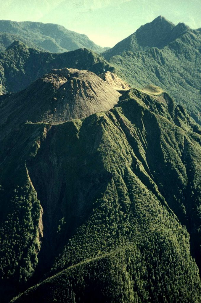 Vista de la cima del Huequi